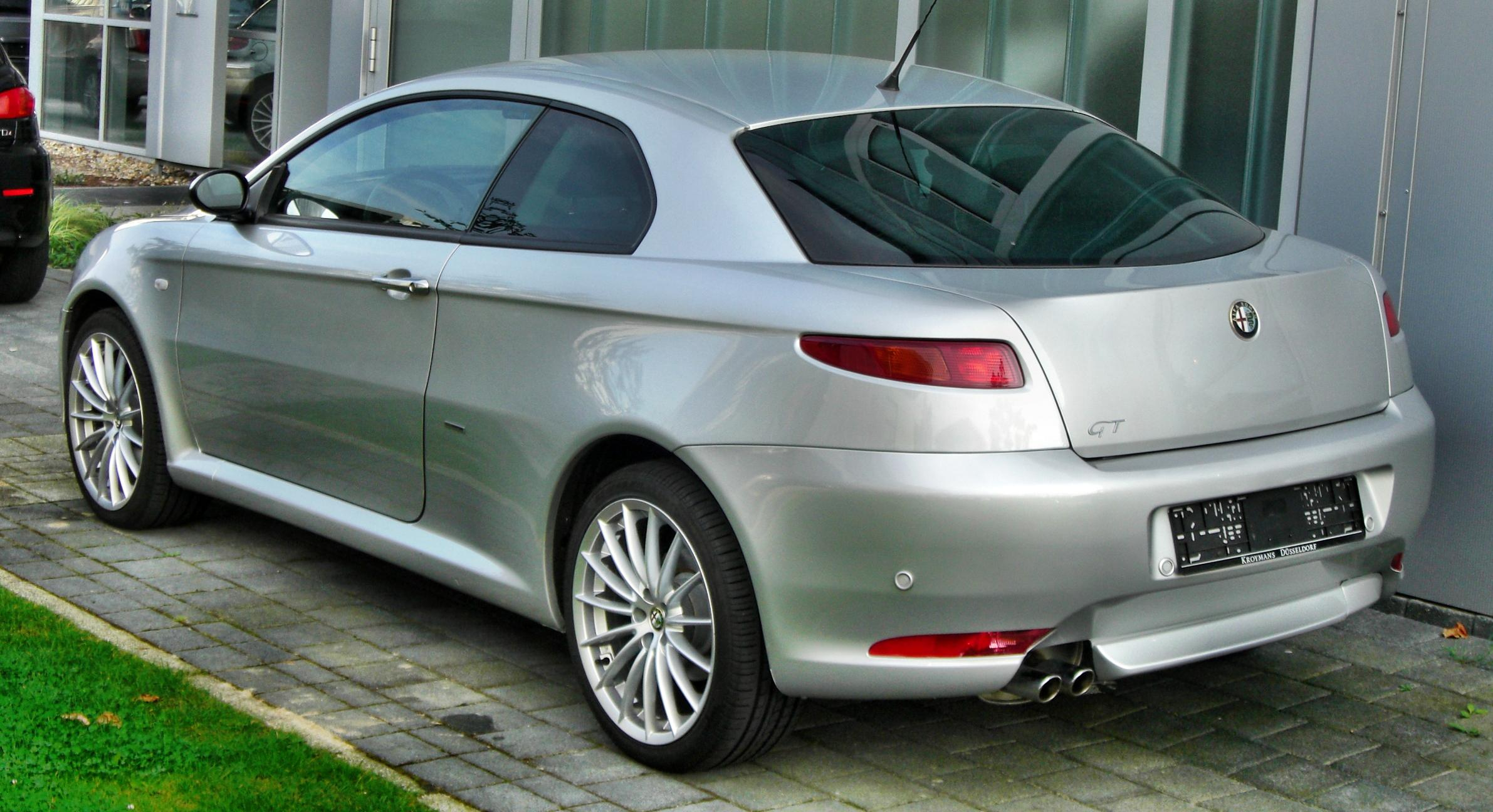 Alfa GT